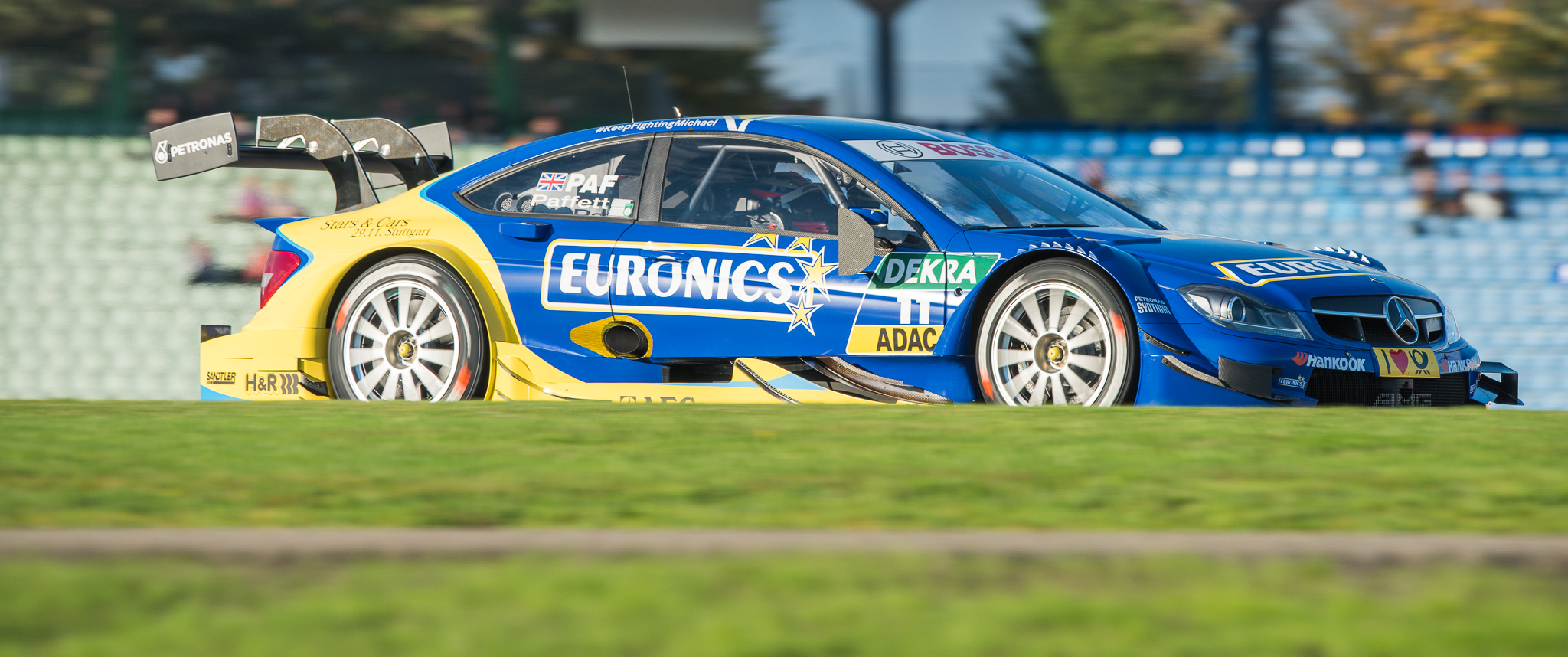 DTM,Deutsche Tourenwagen Masters,EURONICS Mercedes AMG C-Coupe,Gary Paffett,HWA AG,Hockenheimring,Motorsport